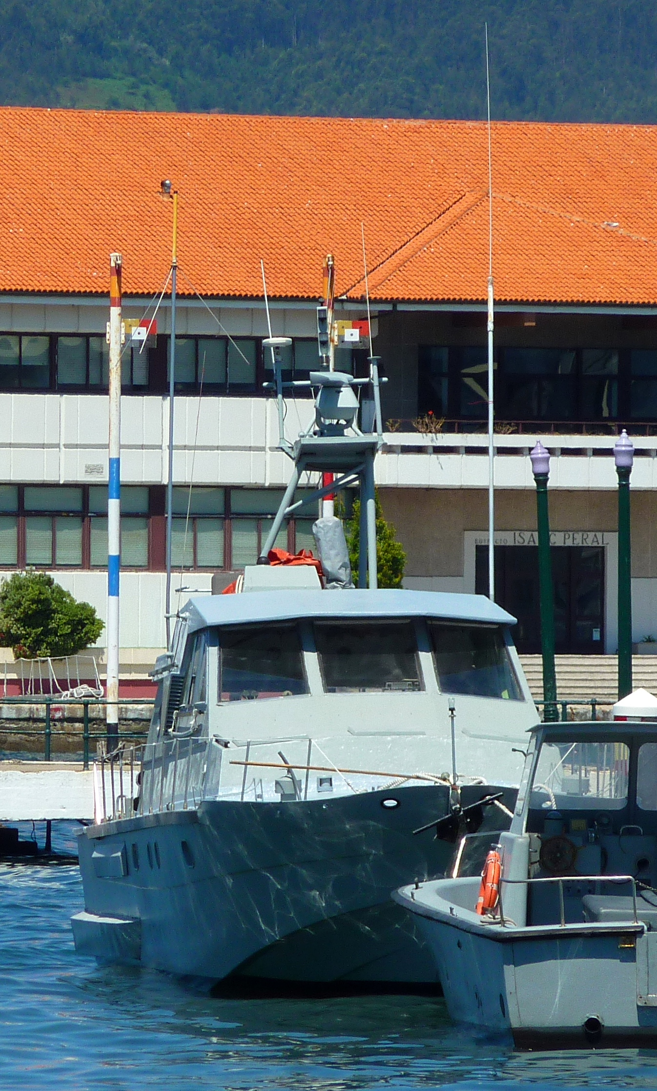 Aresa PVC-160 Y-521 de la Armada Española.